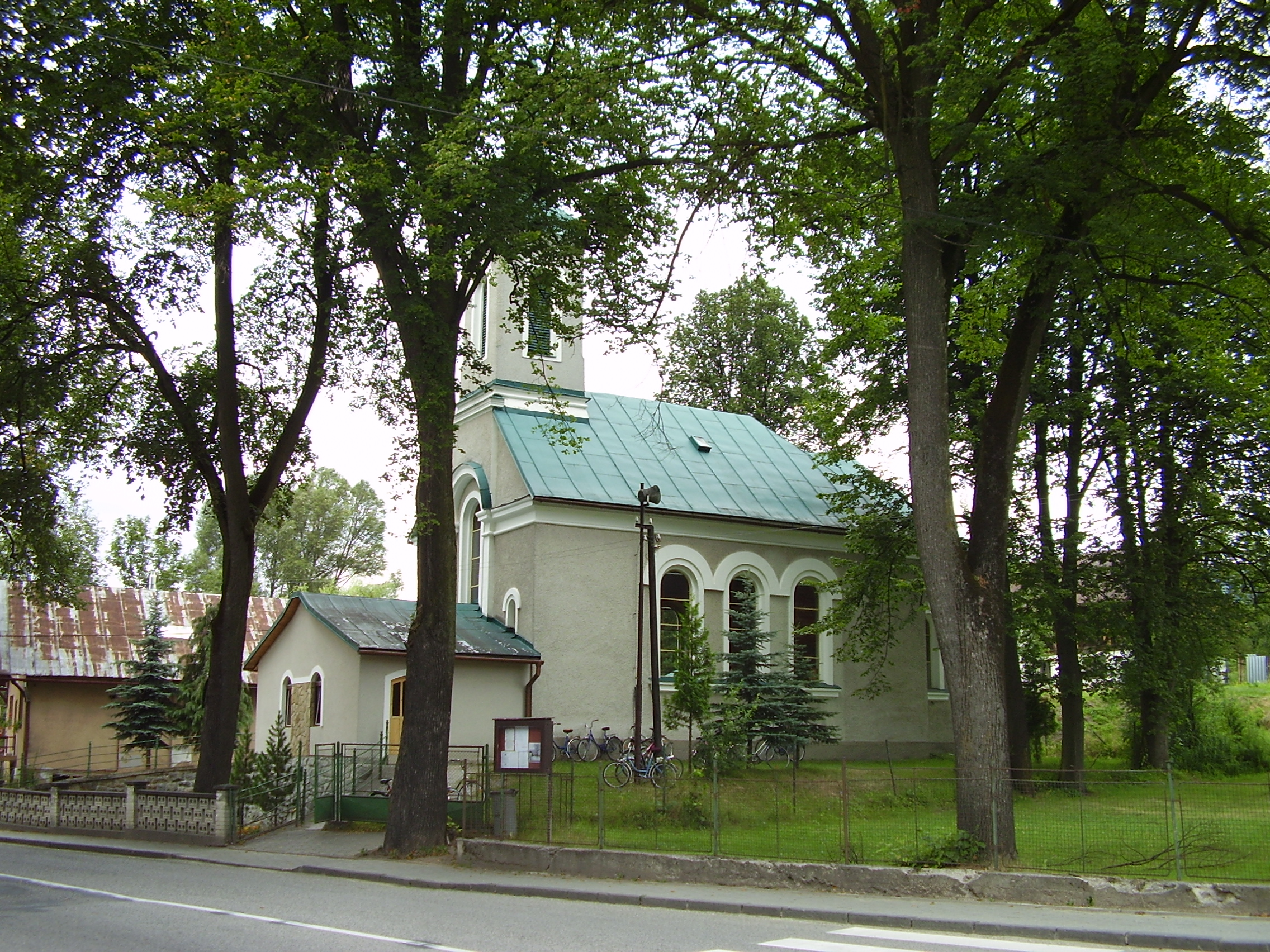 Michalová, okres Brezno, Slovakia